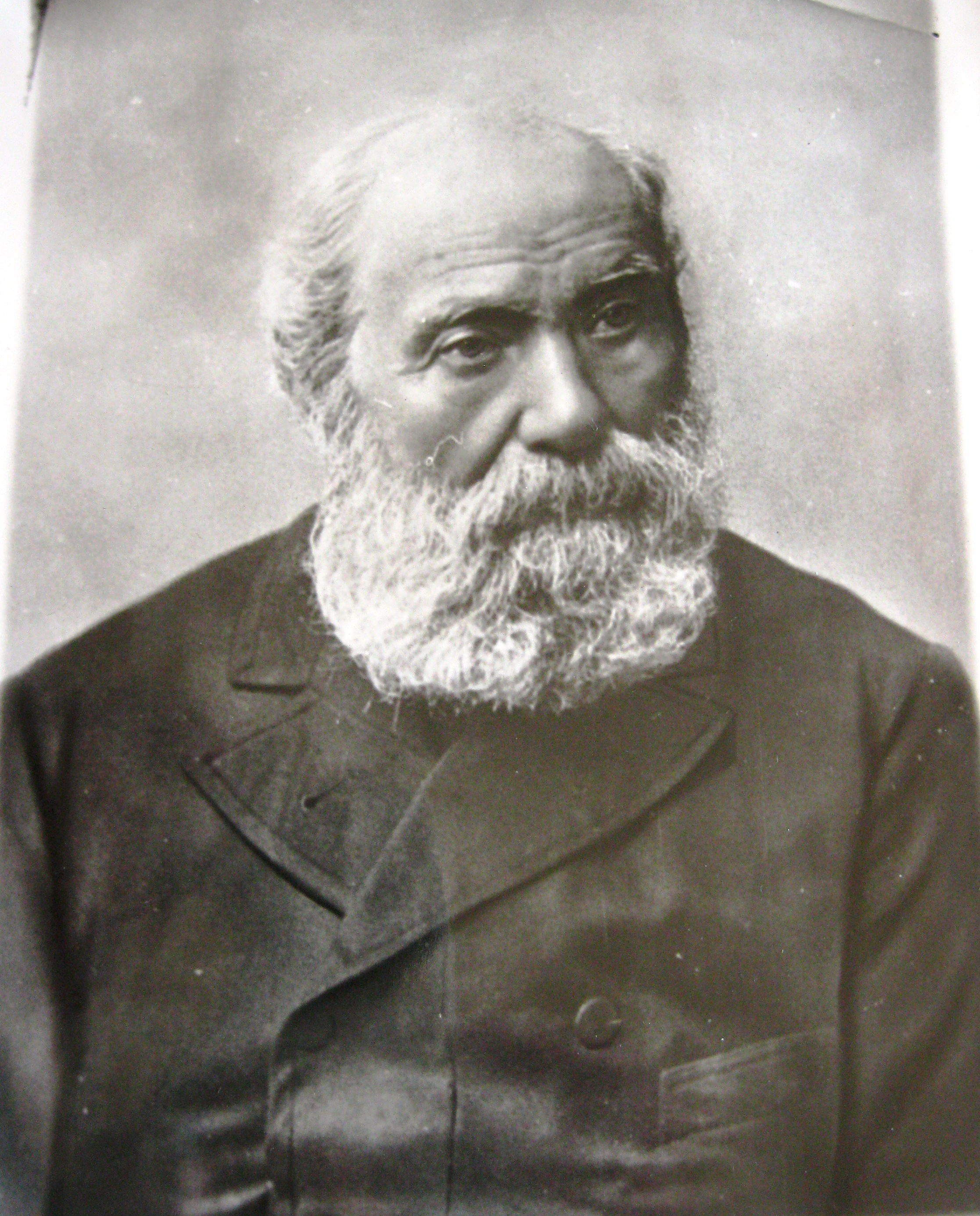 foto d'epoca